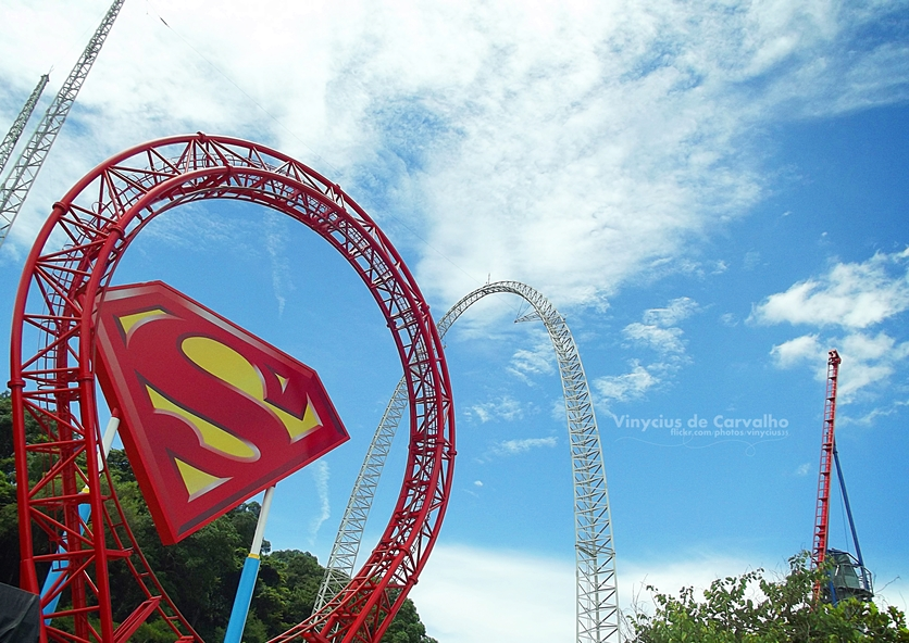 Katapul - Superman em Defesa da Central de Energia